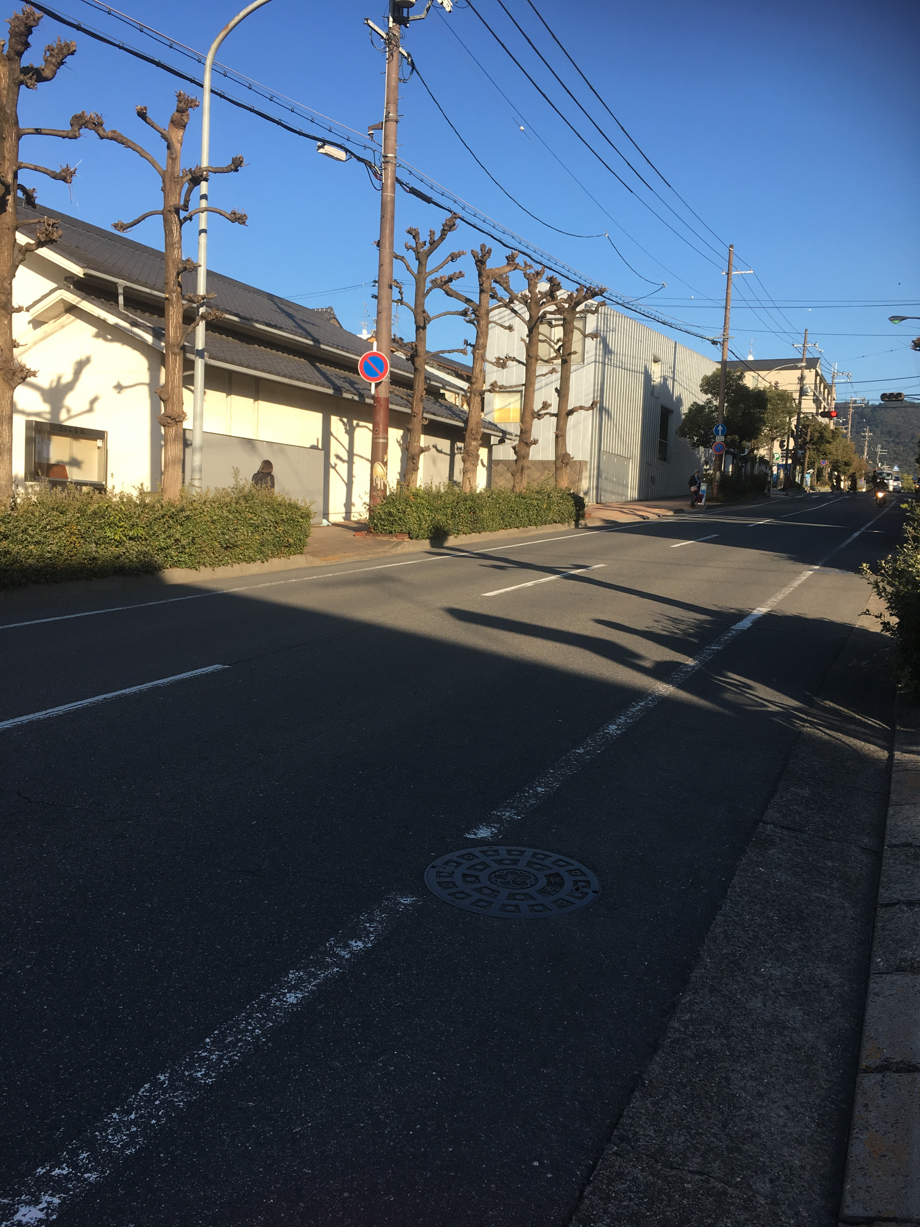 阿字万字町の町並み